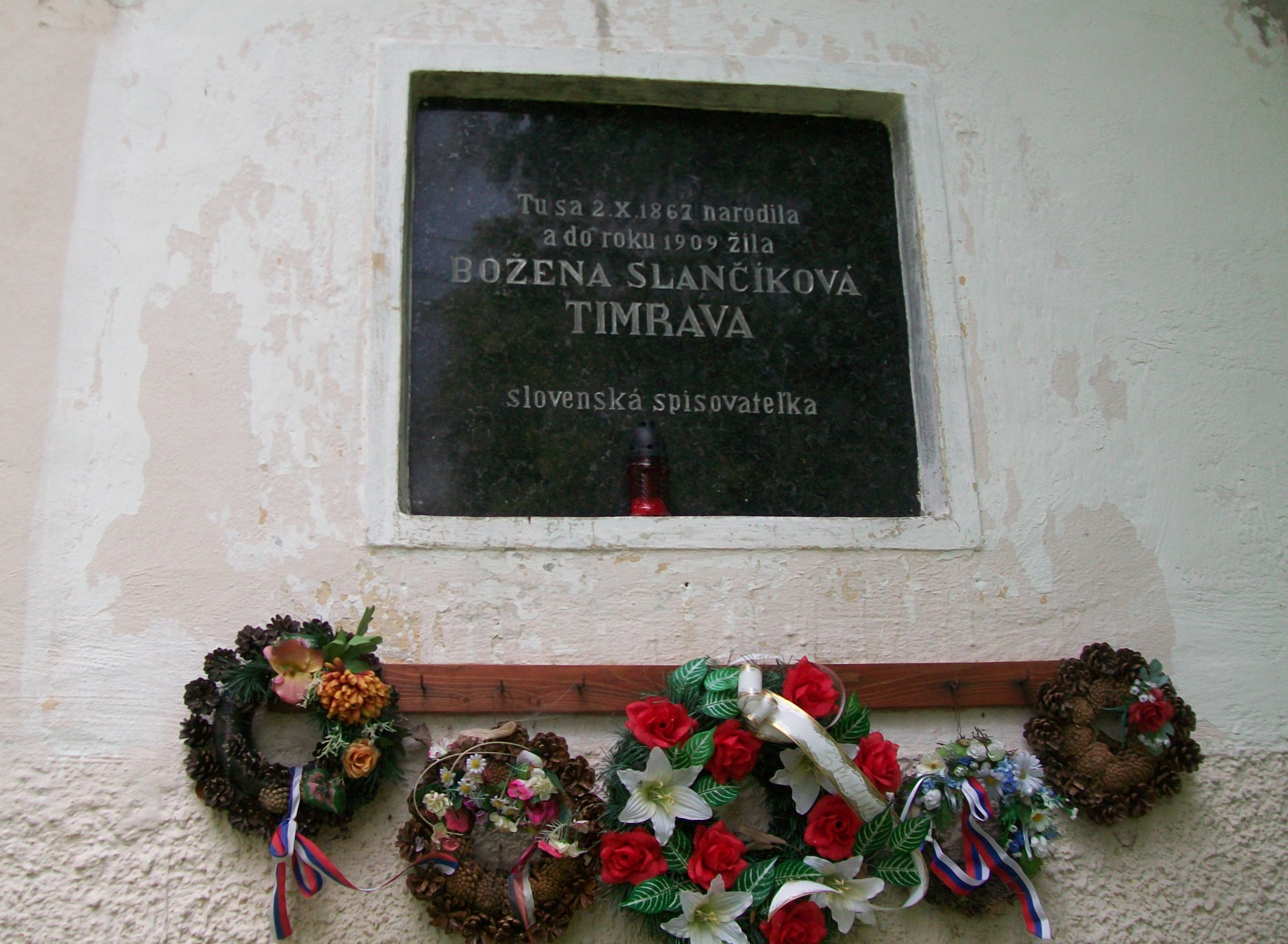 Pamätná tabuľa Boženy Slančíkovej – Timravy v Polichne (kultúrna pamiatka)